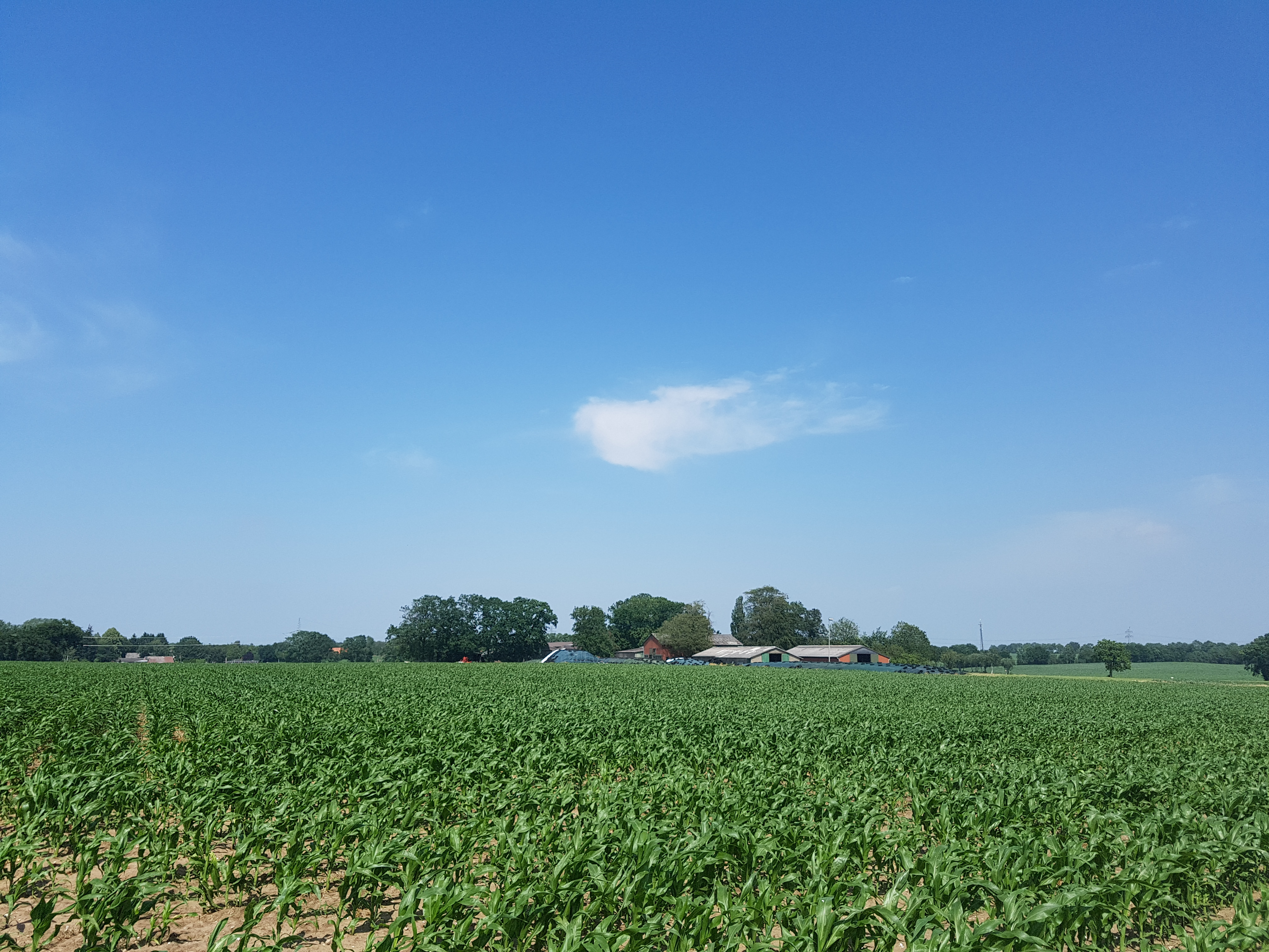 Blick von de Kegelbahn (Deel von Westersood) na Noordoosten op’n Augustenhoff